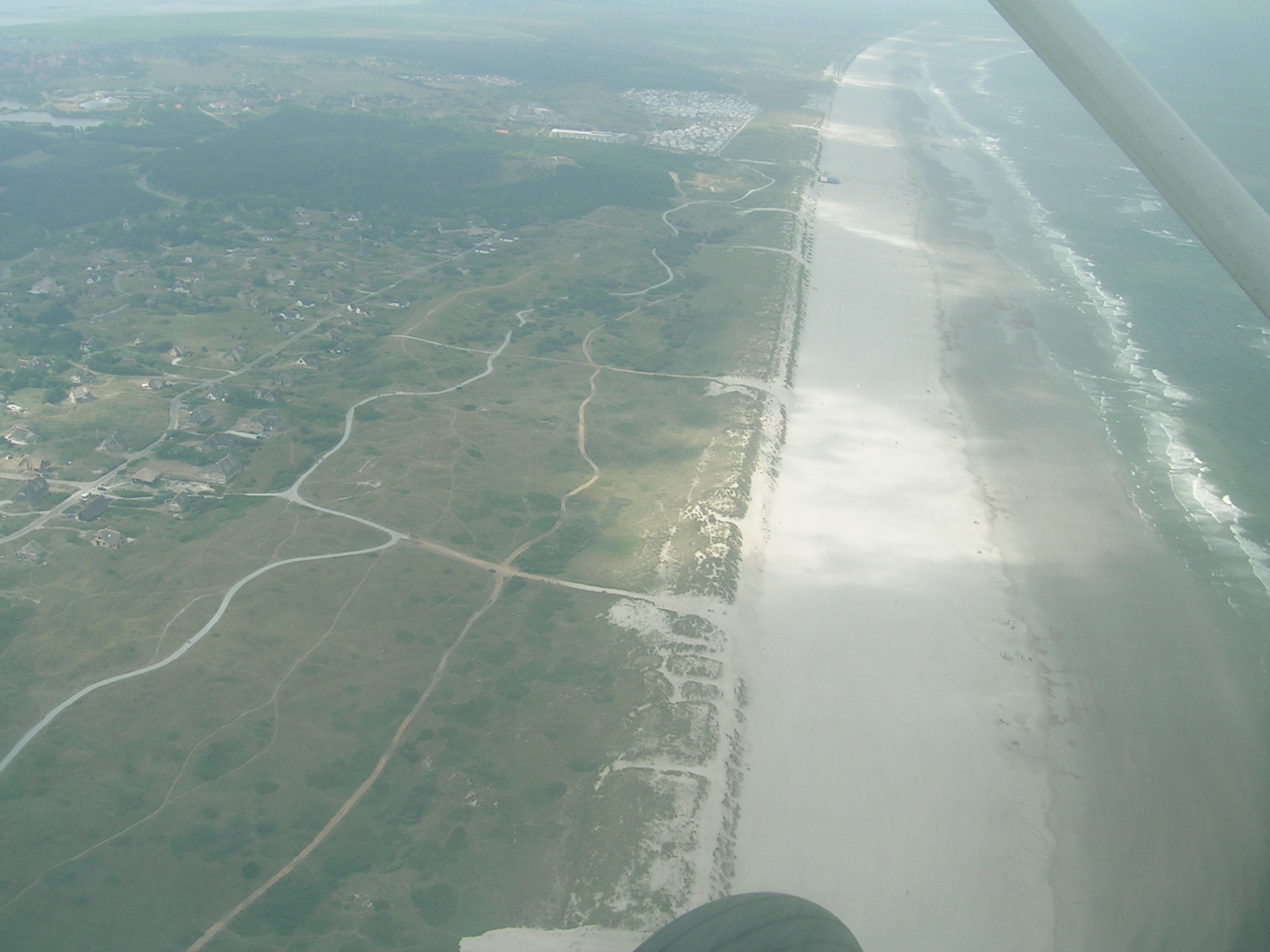 Dünen bei Buren